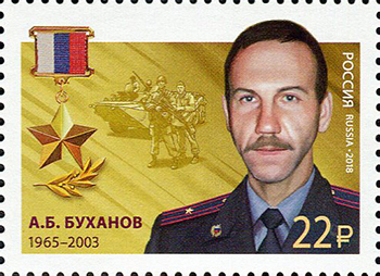 Герои Российской Федерации. А. Б. Буханов (1965—2003).